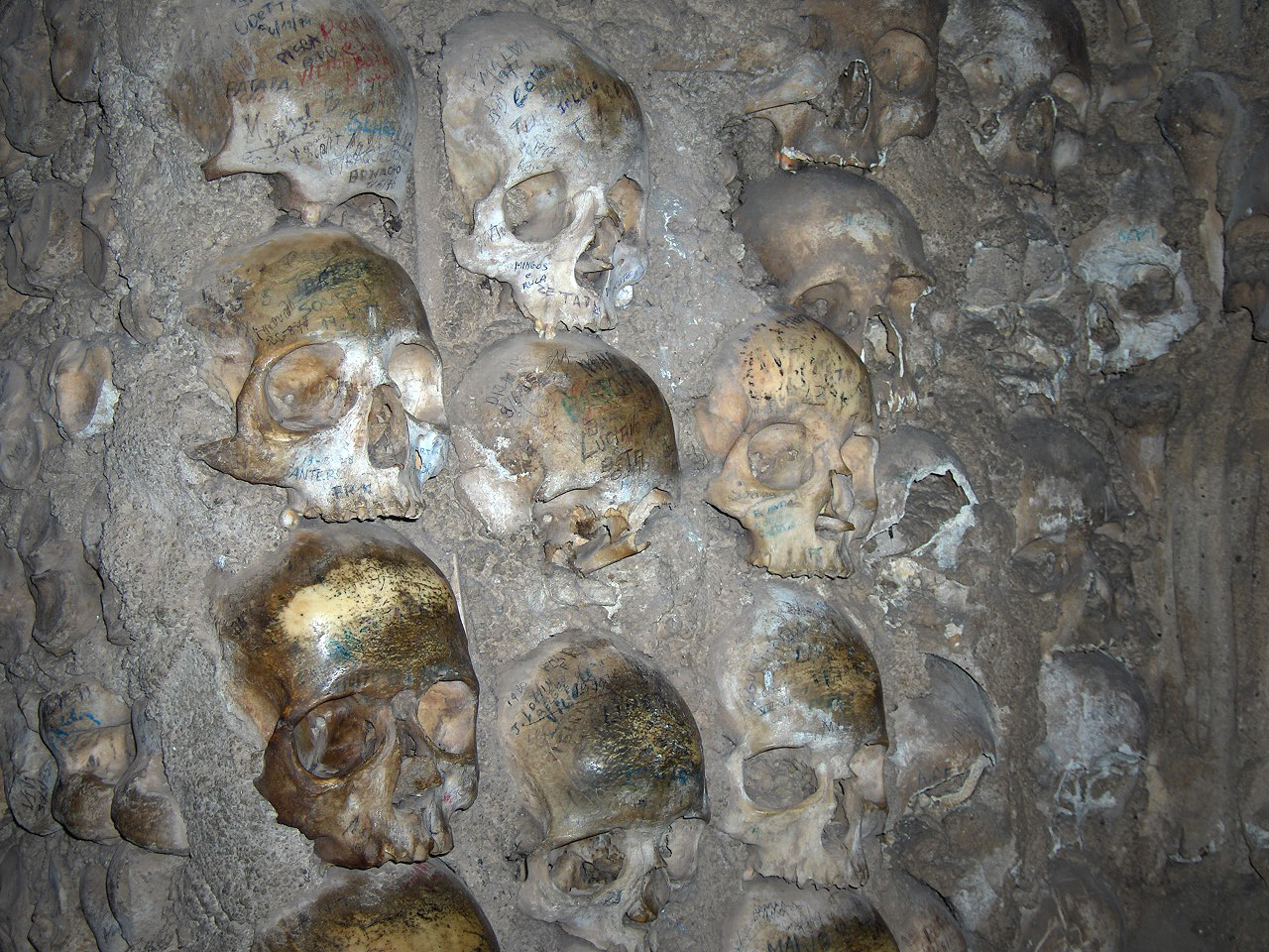 Ossuary (close-up with skulls); Igreja de São Francisco, Évora, Portugal